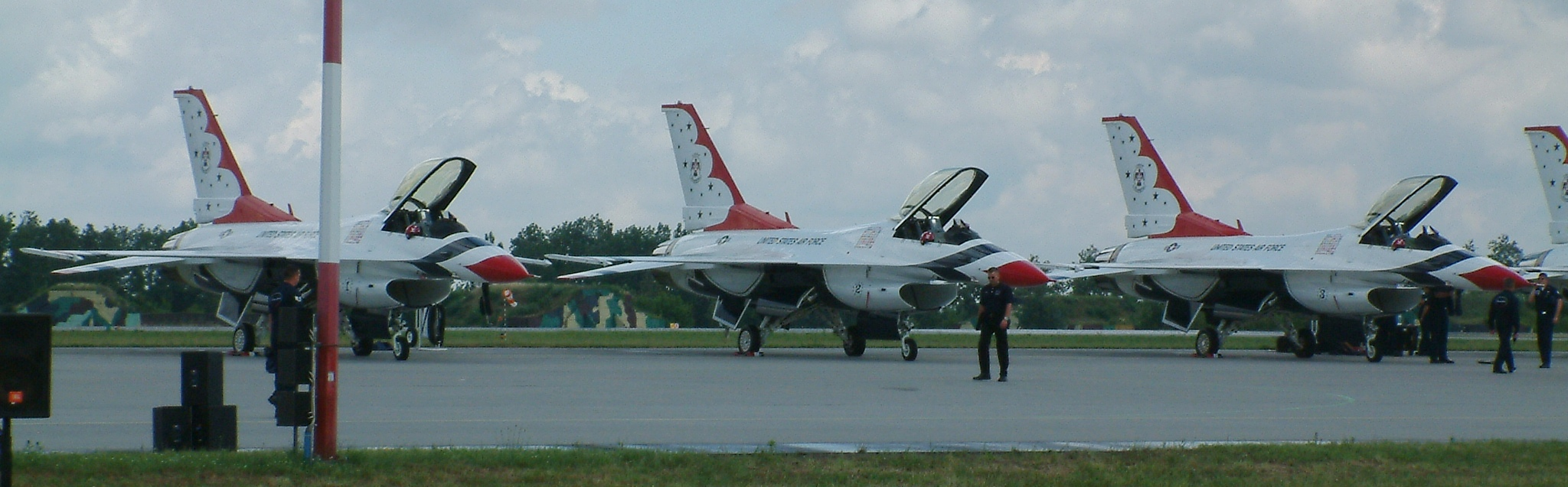 USAF Thunderbirds in 31st Air Base Poznań-Krzesiny, Poland